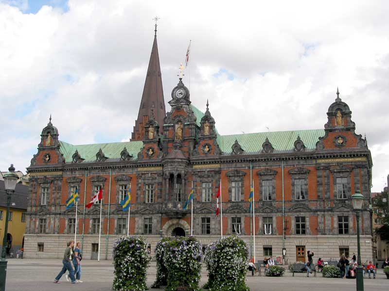 Das Rathaus von Malmö, 28.8.2004. Malmö, Skåne län, Schweden.